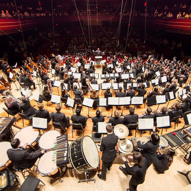 via Instagram ift.tt/1ElKxe8